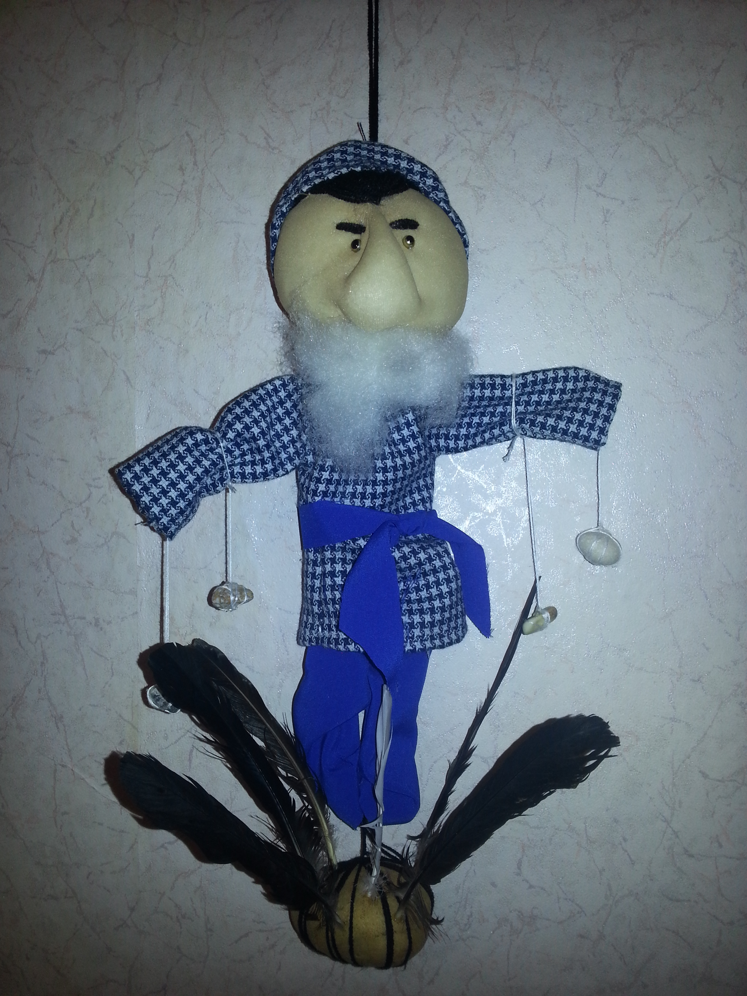 Մեծ Պահքի տիկնիկ